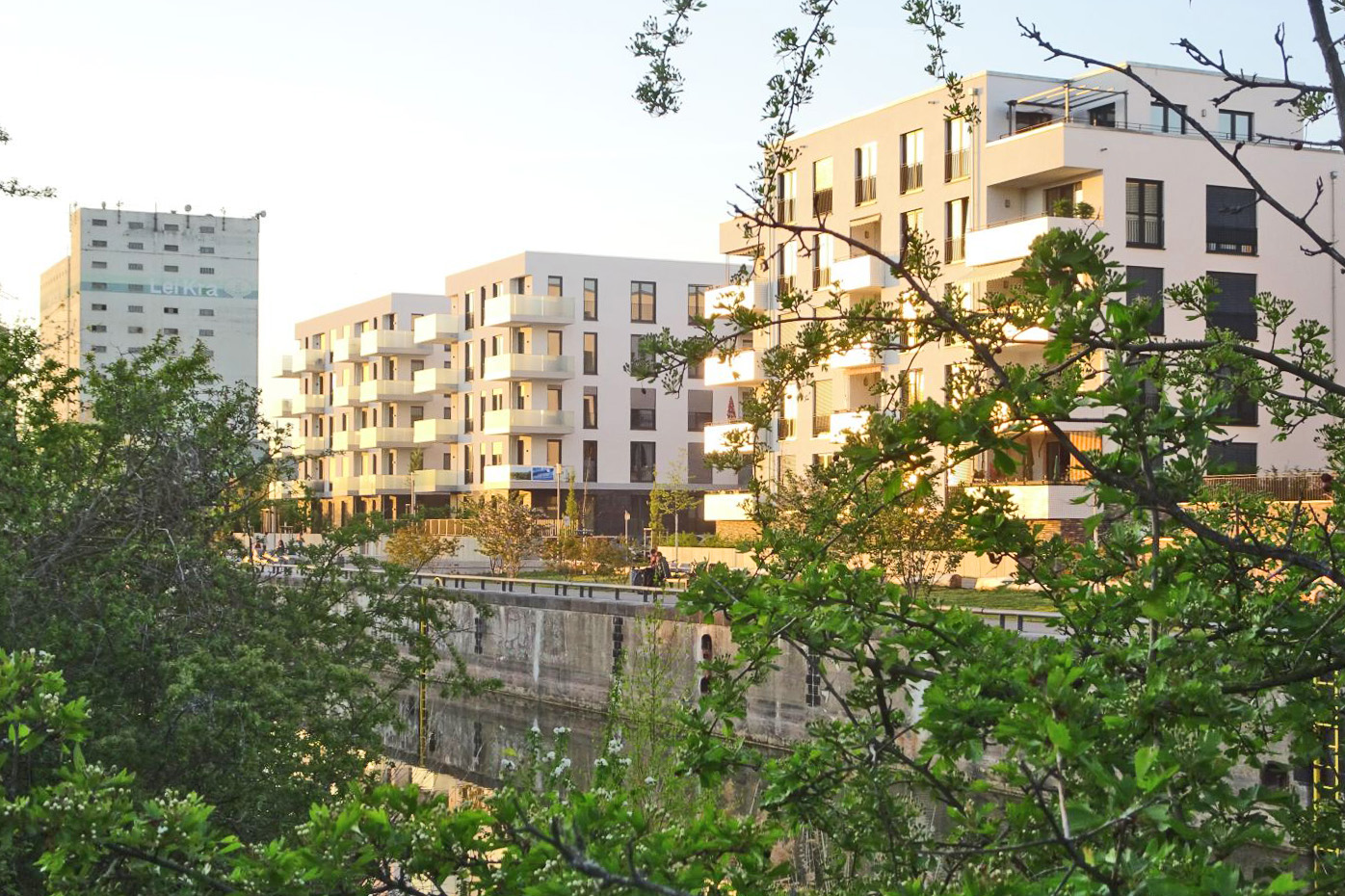 Wohnhäuser in der Leipziger Hafenstraße am Lindenauer Hafen, im Hintergrund das Gebäude der Leikra Leipziger Kraftfuttermittel GmbH